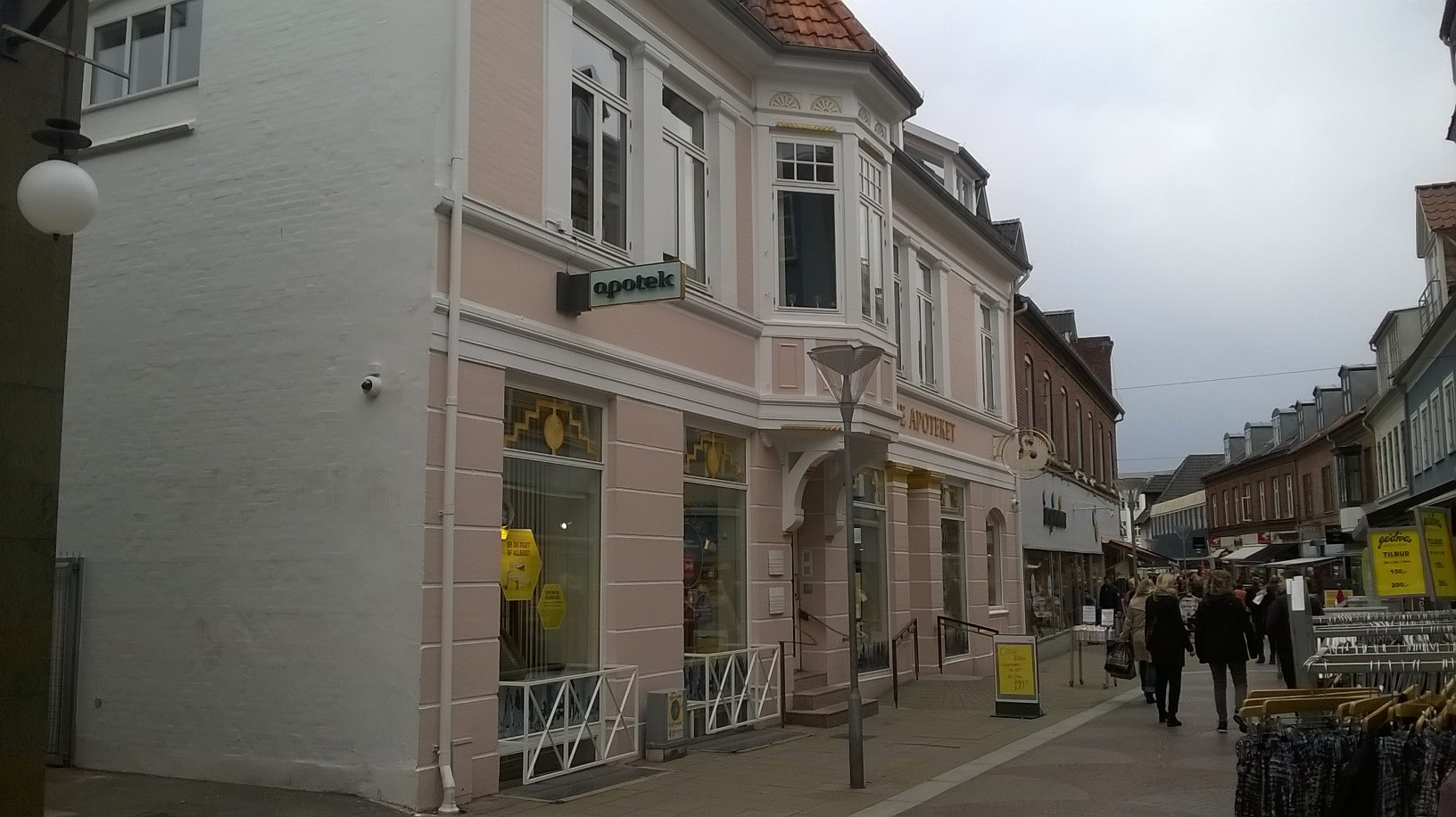 En del af gågaderne i Næstved